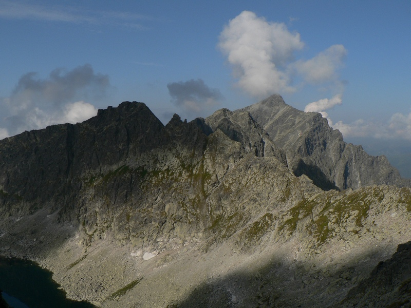 Pohled z Bystrého sedla ke Kriváni.